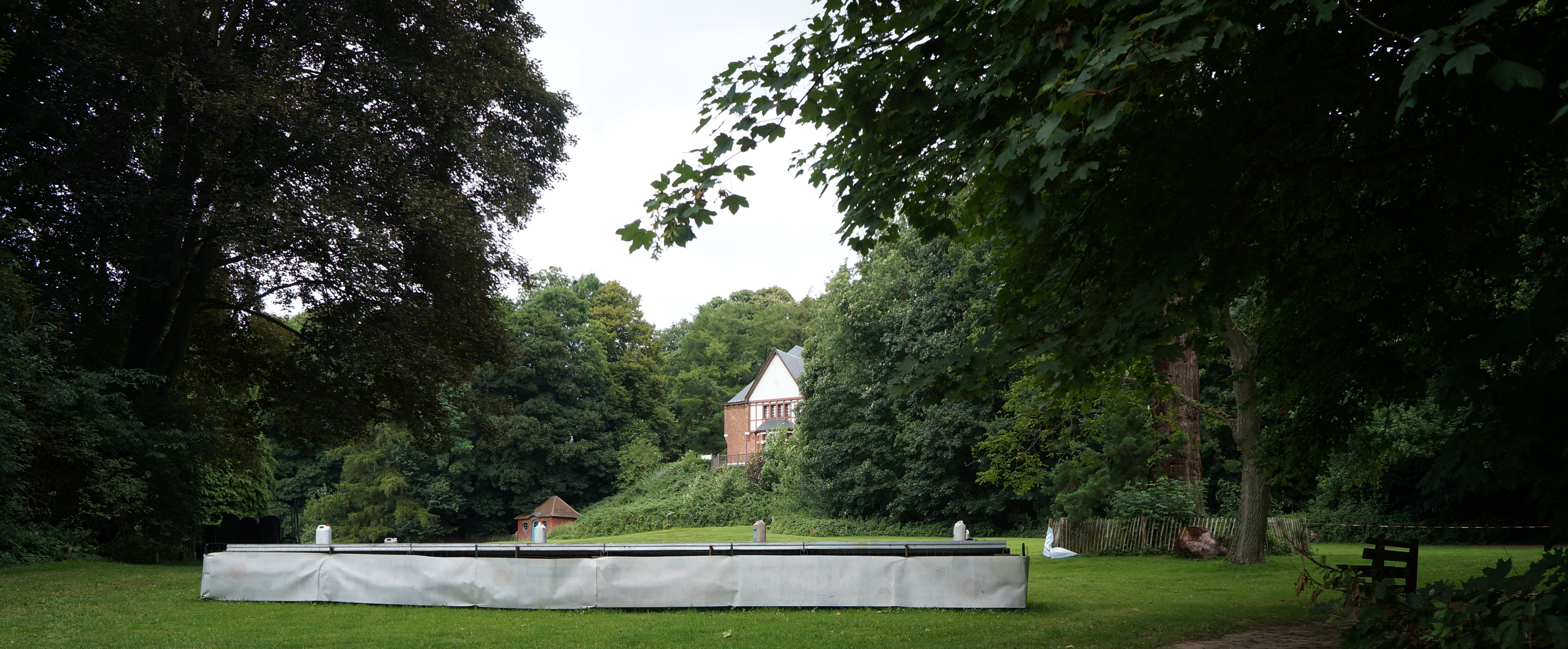 Parc départemental Marguerite Yourcenar Saint-Jans-Cappel, Nord, France